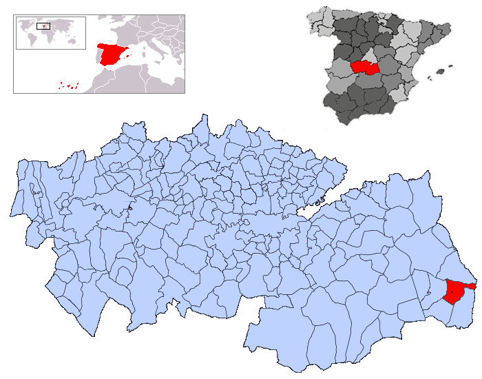 Quintanar de la Orden en la provincia de Toledo